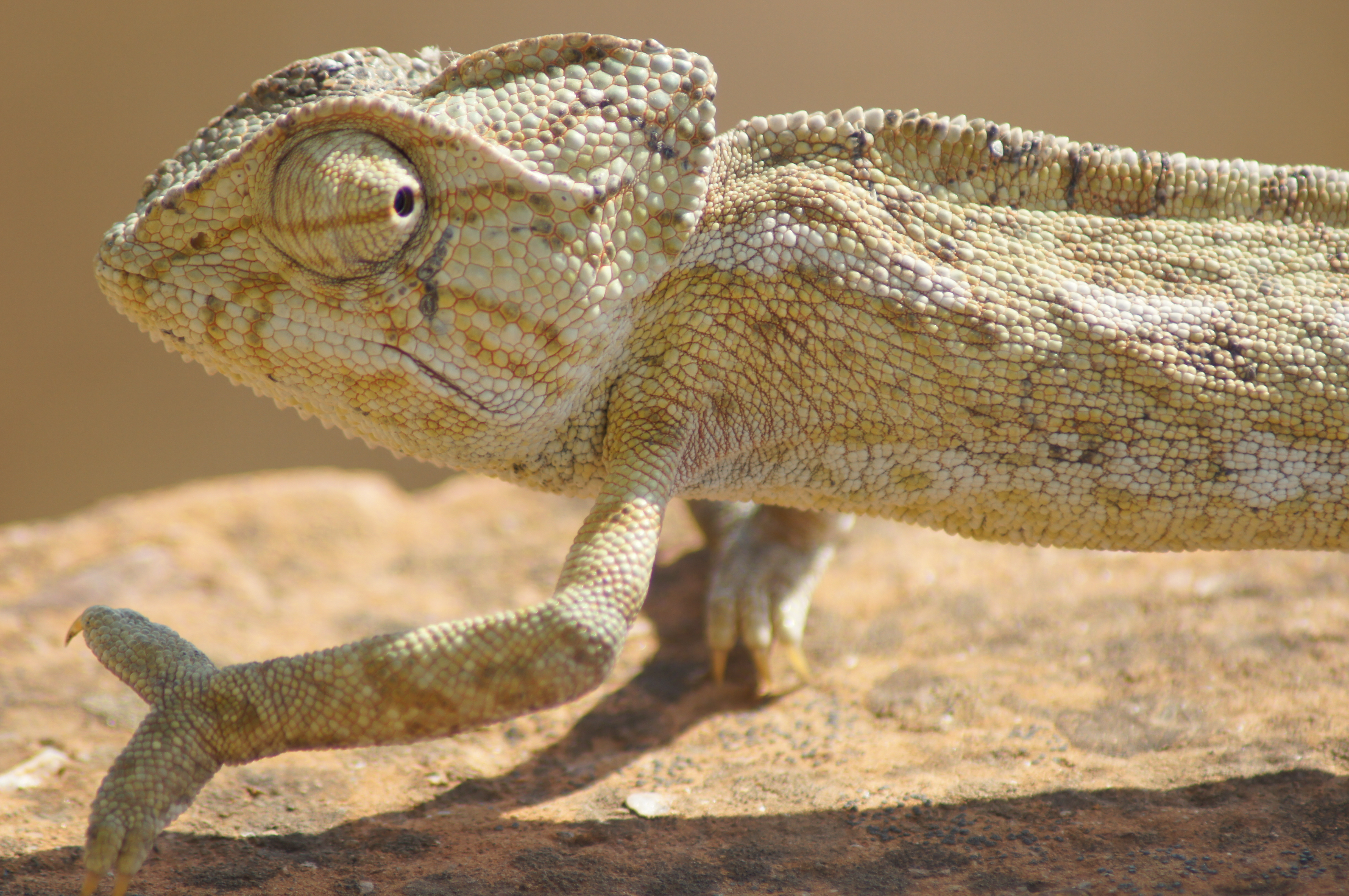 Caméléon commun en Andalousie, Espagne